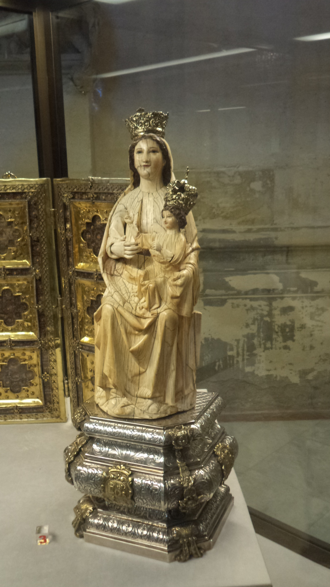 Virgen de las Batallas en la Sacristía mayor de la catedral de Sevilla.